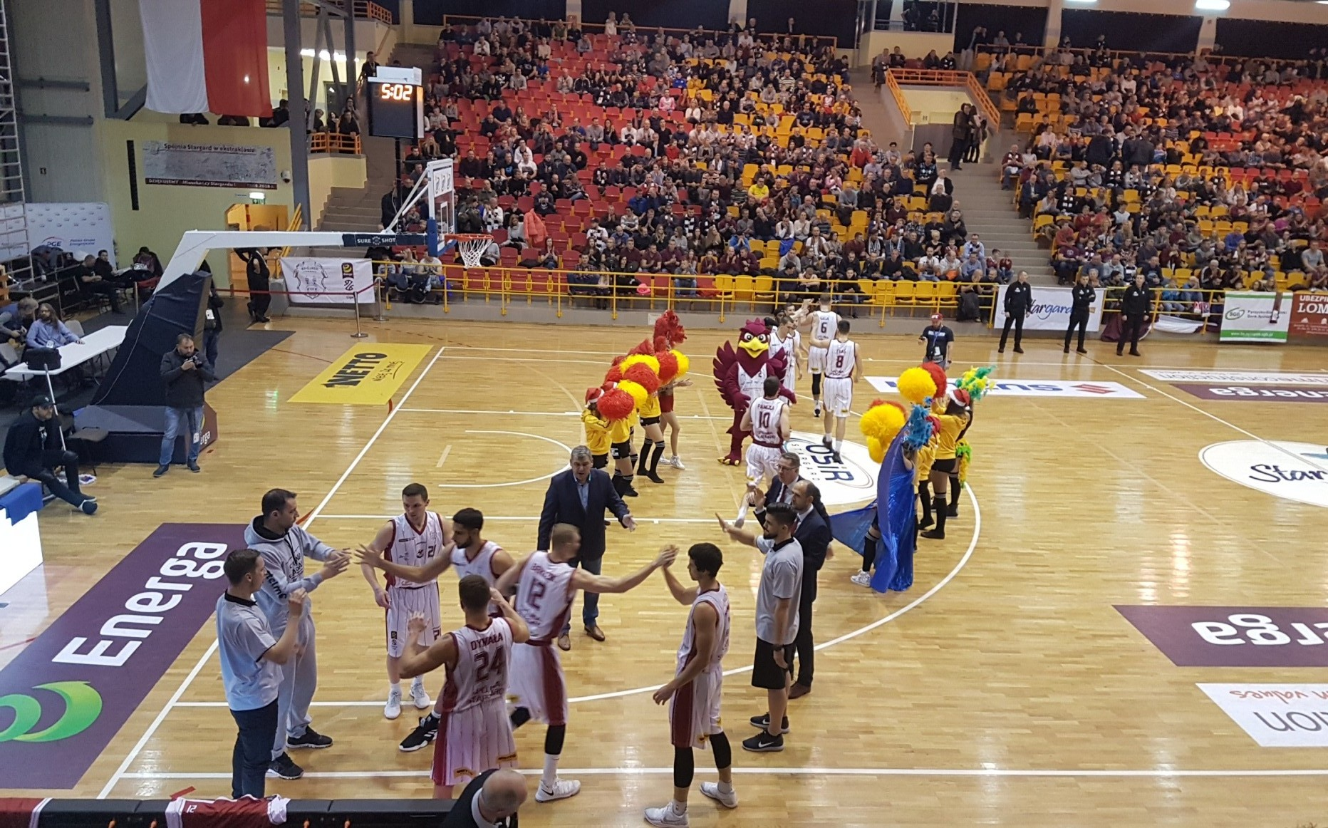 Prezentacja: Spójnia Stargard (16.21.2018)